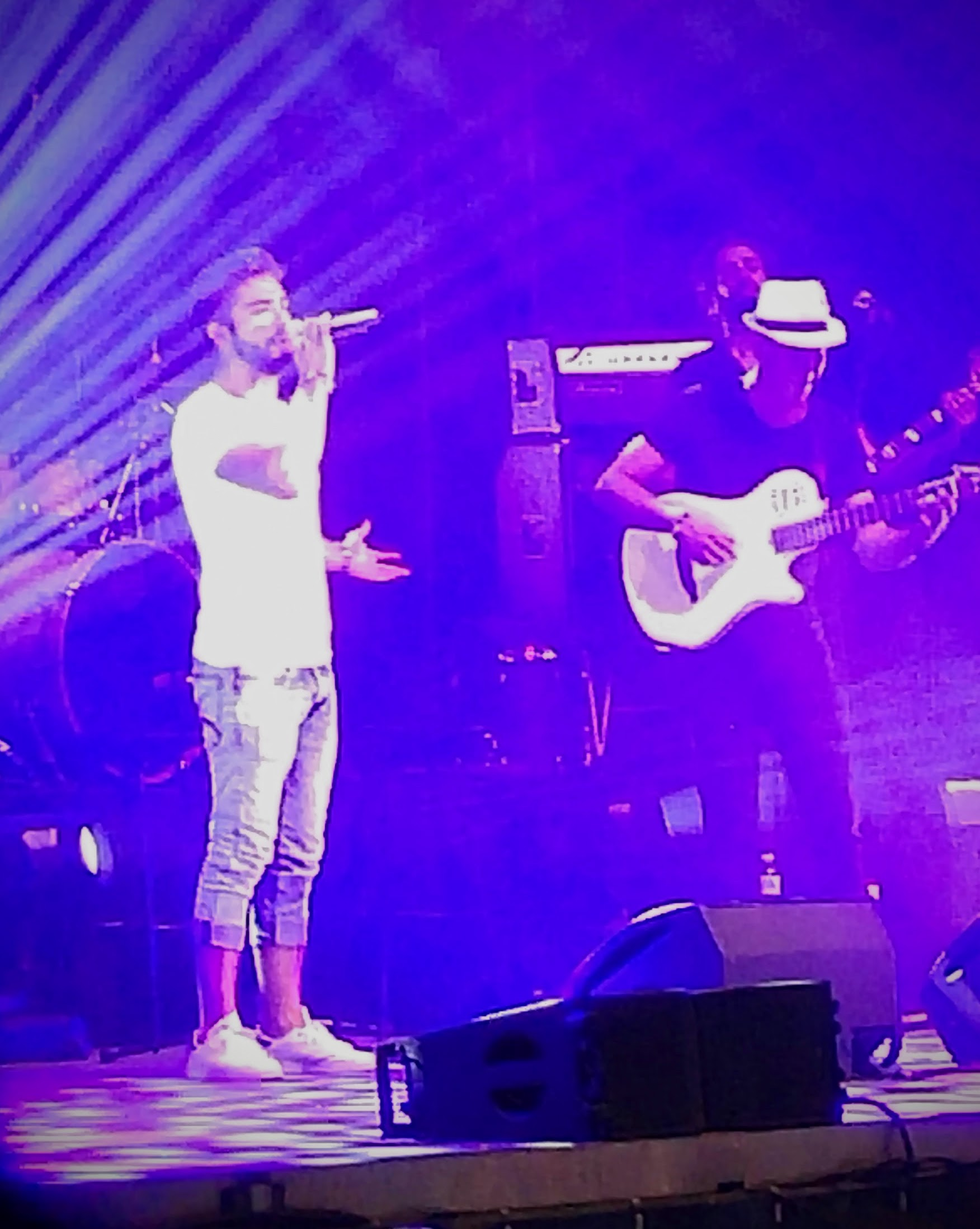 Kendji Girac lors d'un concert à Montauban